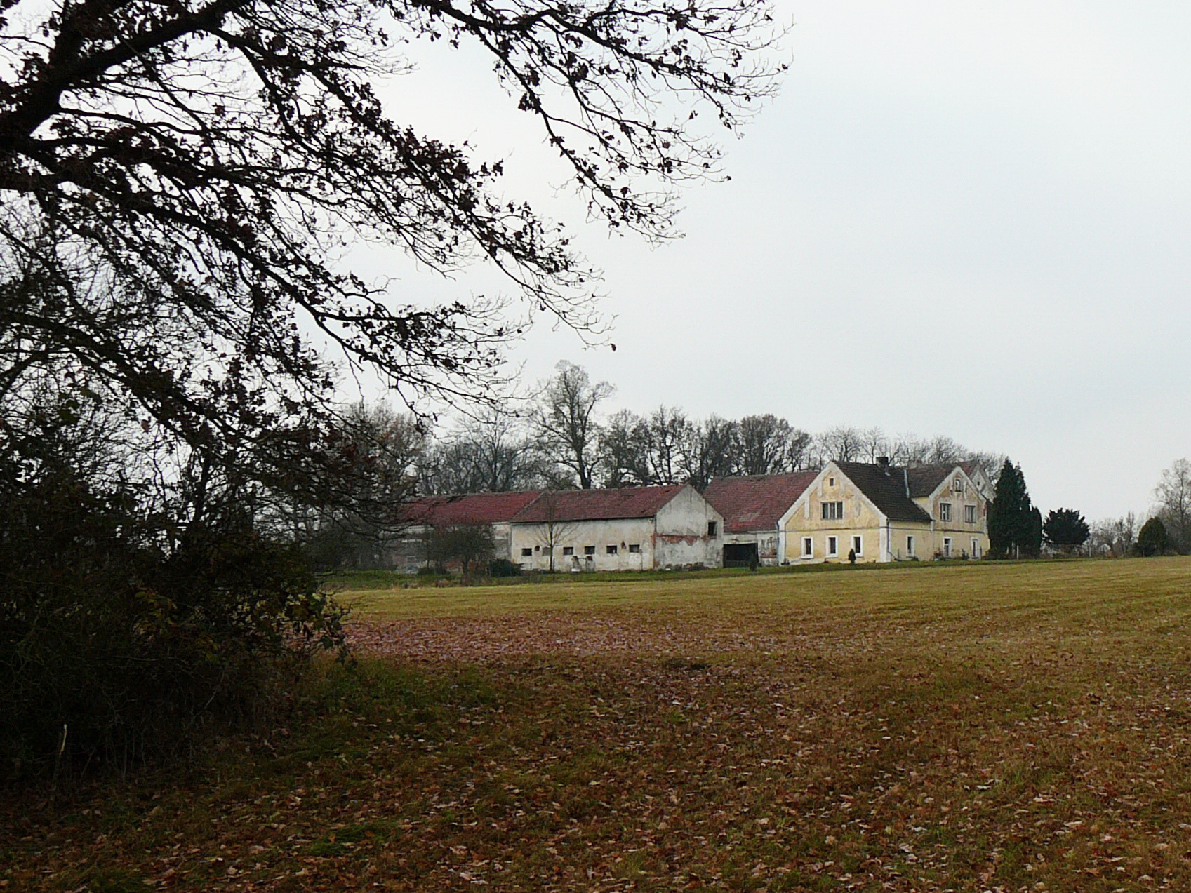 Ein Bauernhof in Förba.